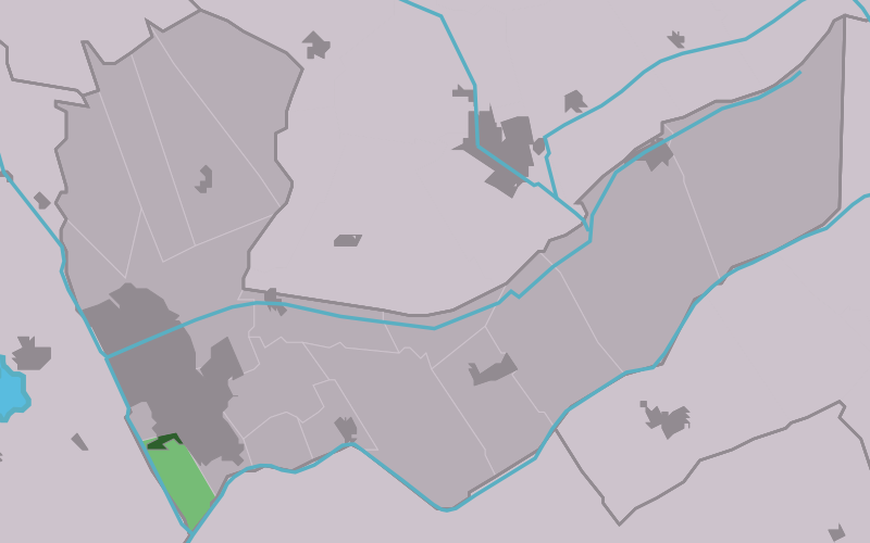 Kaartsje fan himrik fan Nijskoat